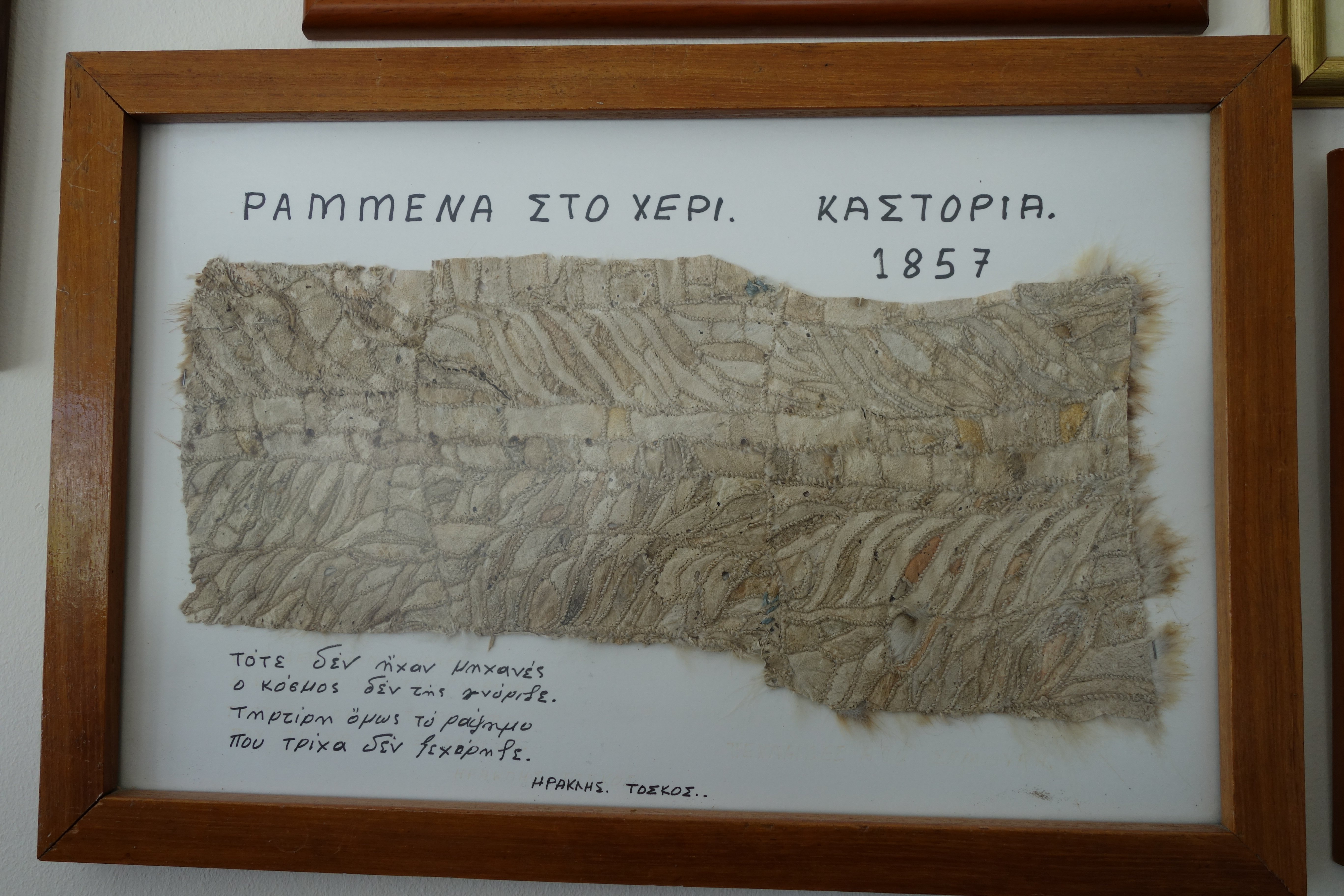 Kürschner in der Stadt Kastoria, Griechenland. P. K. Z. Furs SA., Christos Papadopoulos, Petra Place. Gerahmtes, handgenähtes Fellstückenteil aus dem Jahr 1857 im Büro von Christos Papadopoulos. Übersetzung aus dem Griechischen: „Handgenäht, Kastoria 1857.“ „Dann gab es noch keine Maschinen die Menschen kannten sie nicht ,“ „tirtiri aber das Nähen, das Haar nicht zu unterscheiden.“ (= nicht auffällig) „Iraklis Toskos“ (der Kürschner, der das Stück Christos Papadopoulos schenkte). „Tirtiri = argo…………. (oder ein dem Übersetzer nicht bekanntes Wort).“